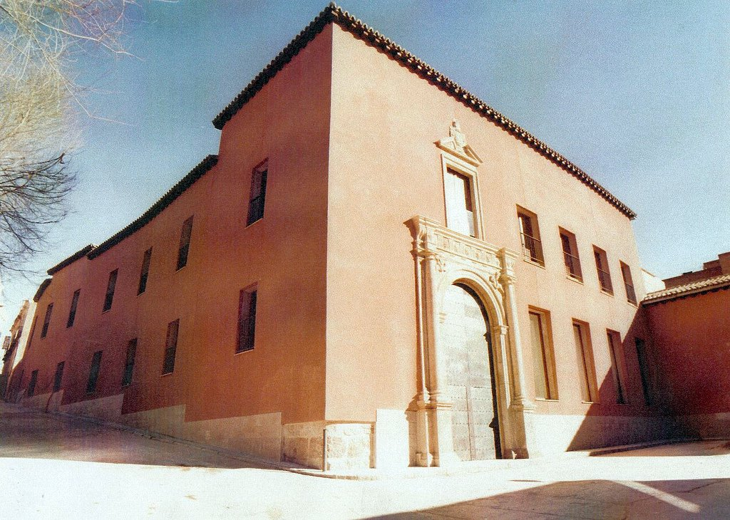 Palacio de los Dávalos (Guadalajara) tras su restauración.